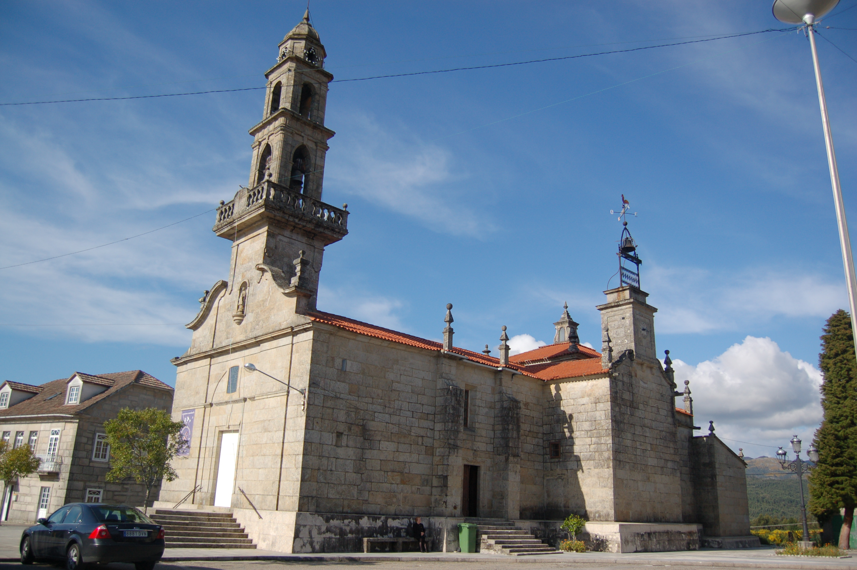 Igrexa parroquial de San Lourenzo de Fornelos de Montes (Fornelos de Montes)